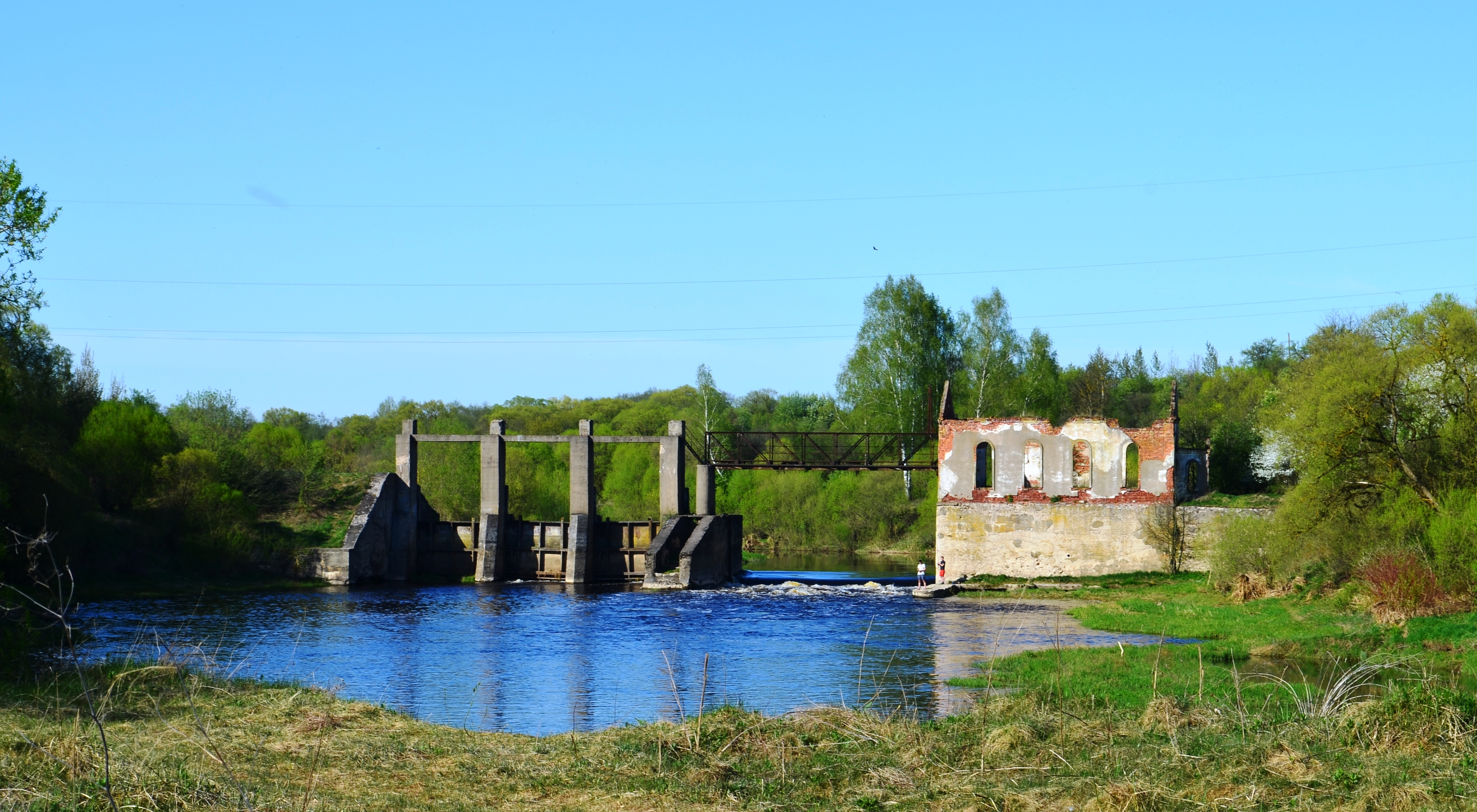 Kruosto vandens jėgainės ant Nevėžio griuvėsiai, Kėdainių raj.